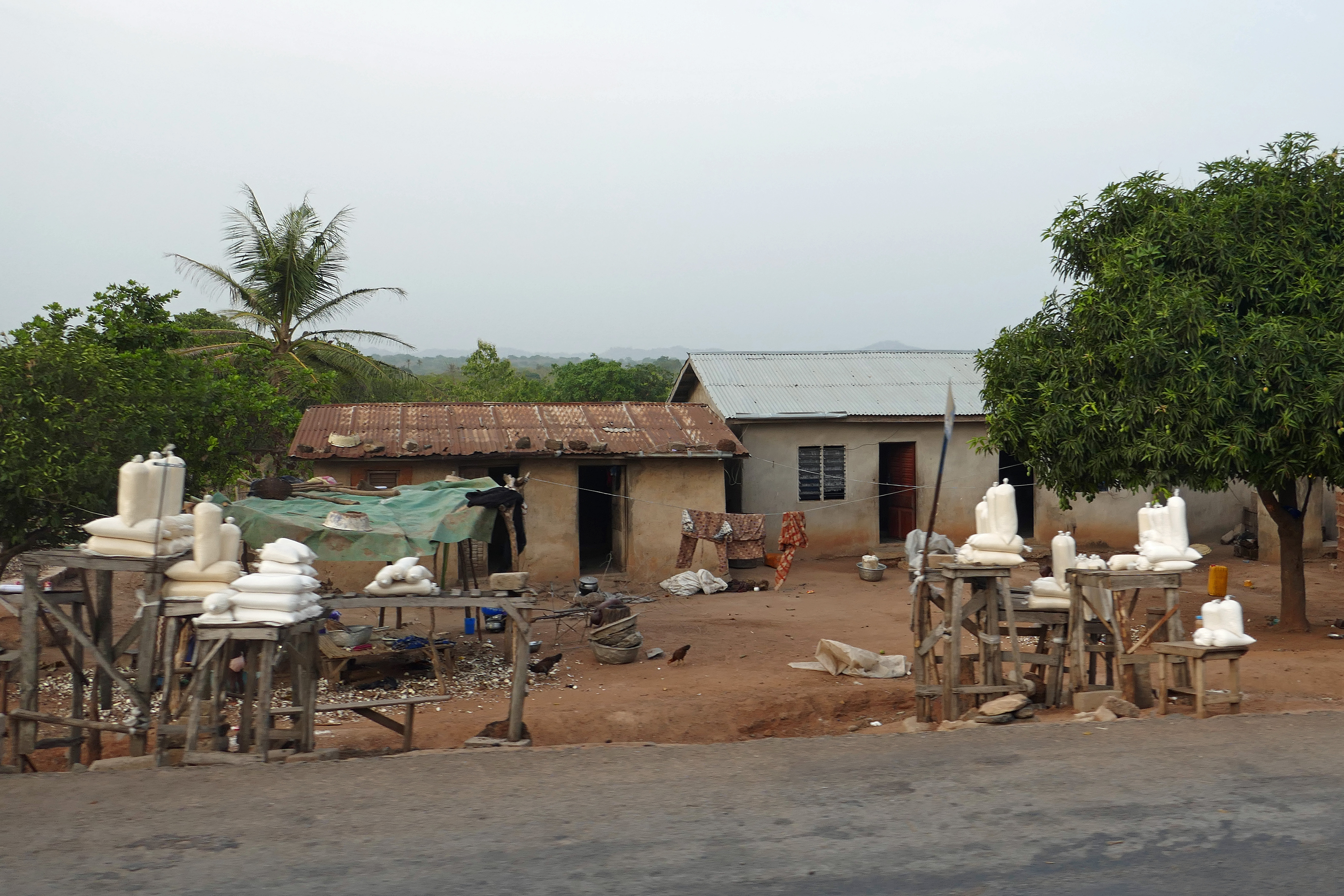 Bénin : vente de sacs de gari (farine de manioc) au bord de la route, dans la région de Savalou.